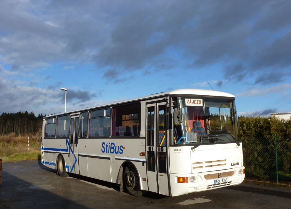 Autobus Karosa - Renault Recreo (C 935) s kapacitou 46 cestujících. Autobus provozuje autobusová doprava Petr Stibor - StiBus.